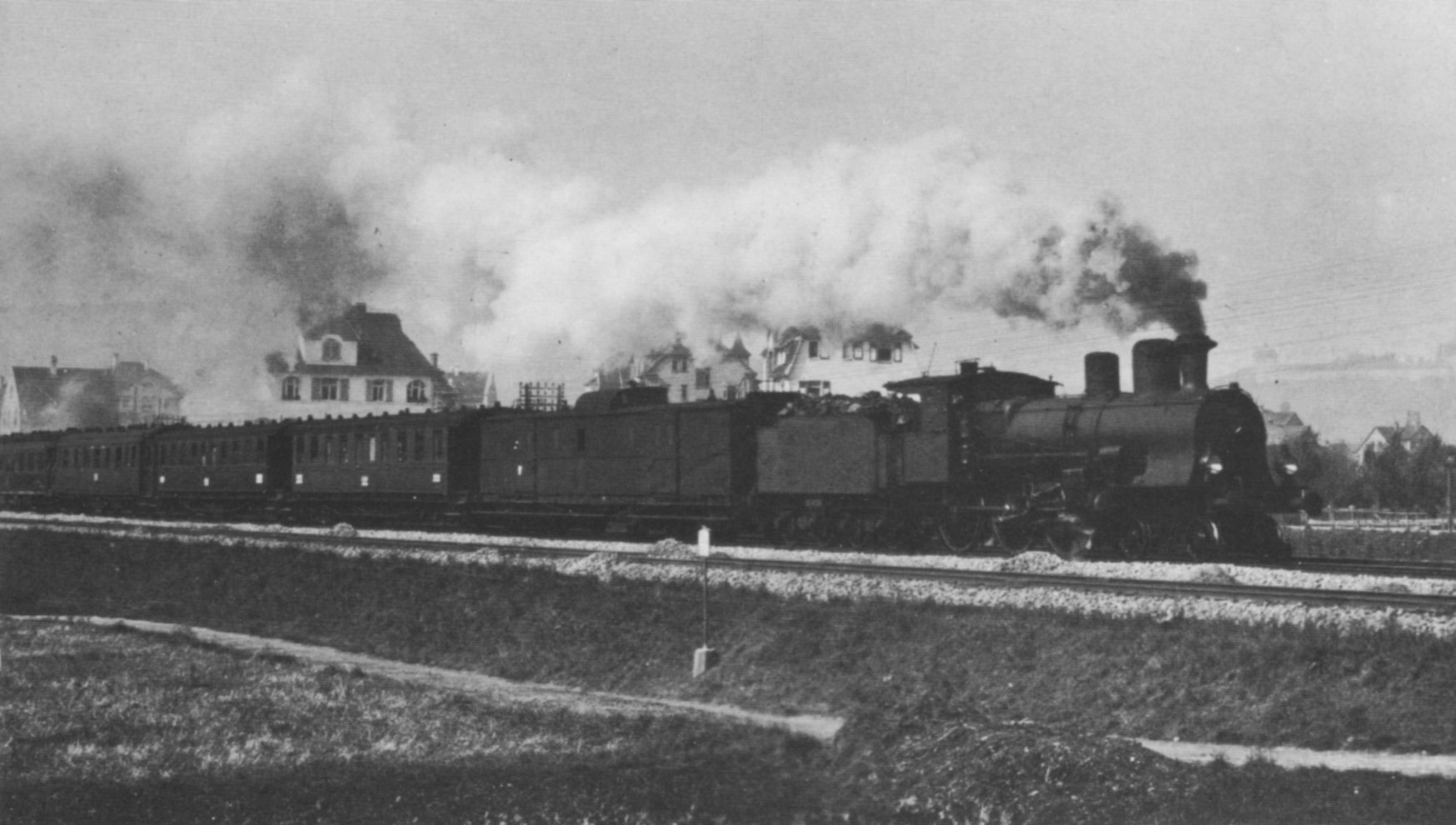 Dampflokomotive Württembergische D mit Schnellzug in Esslingen.